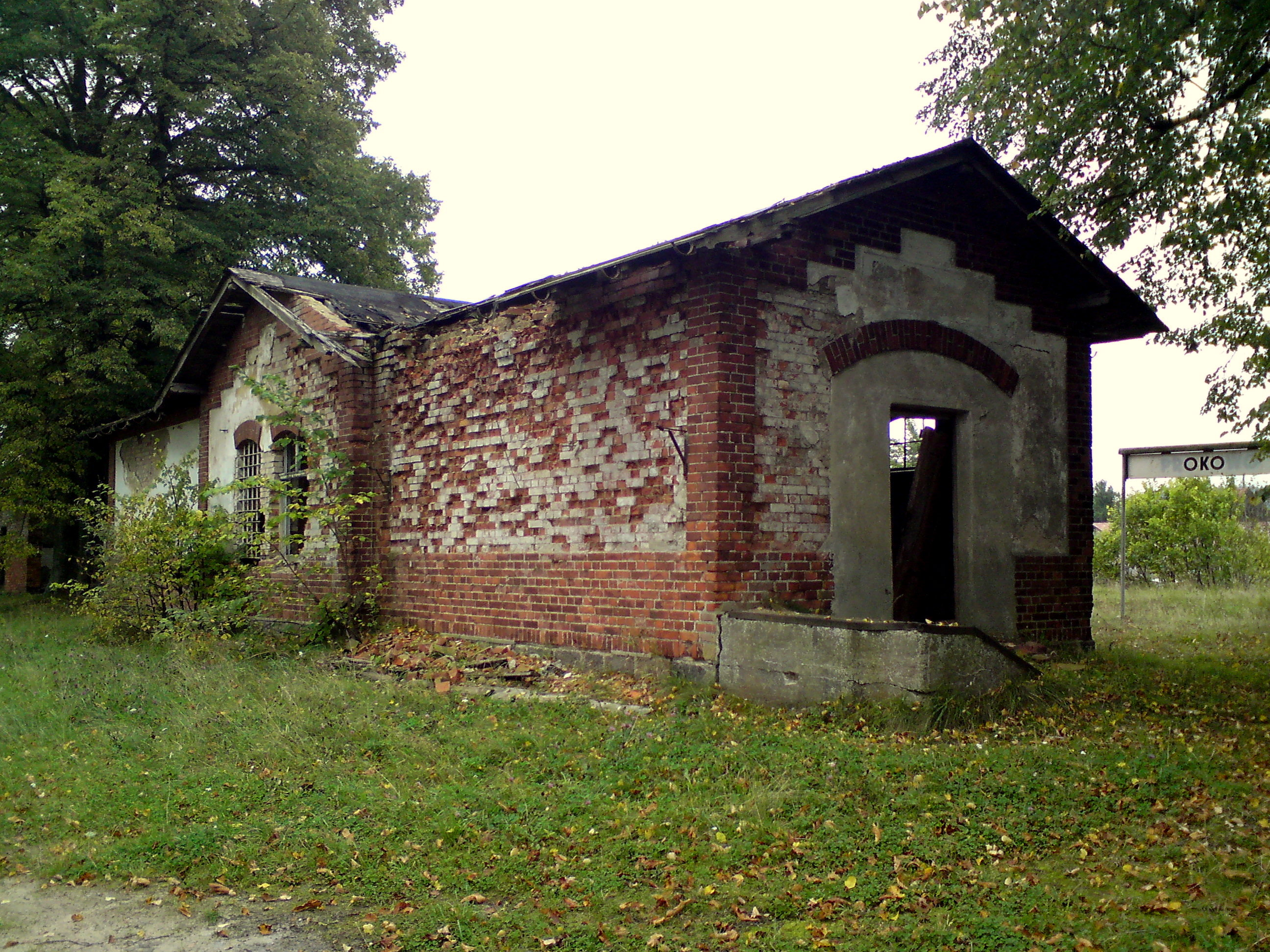 budynek stacji w Prokowie